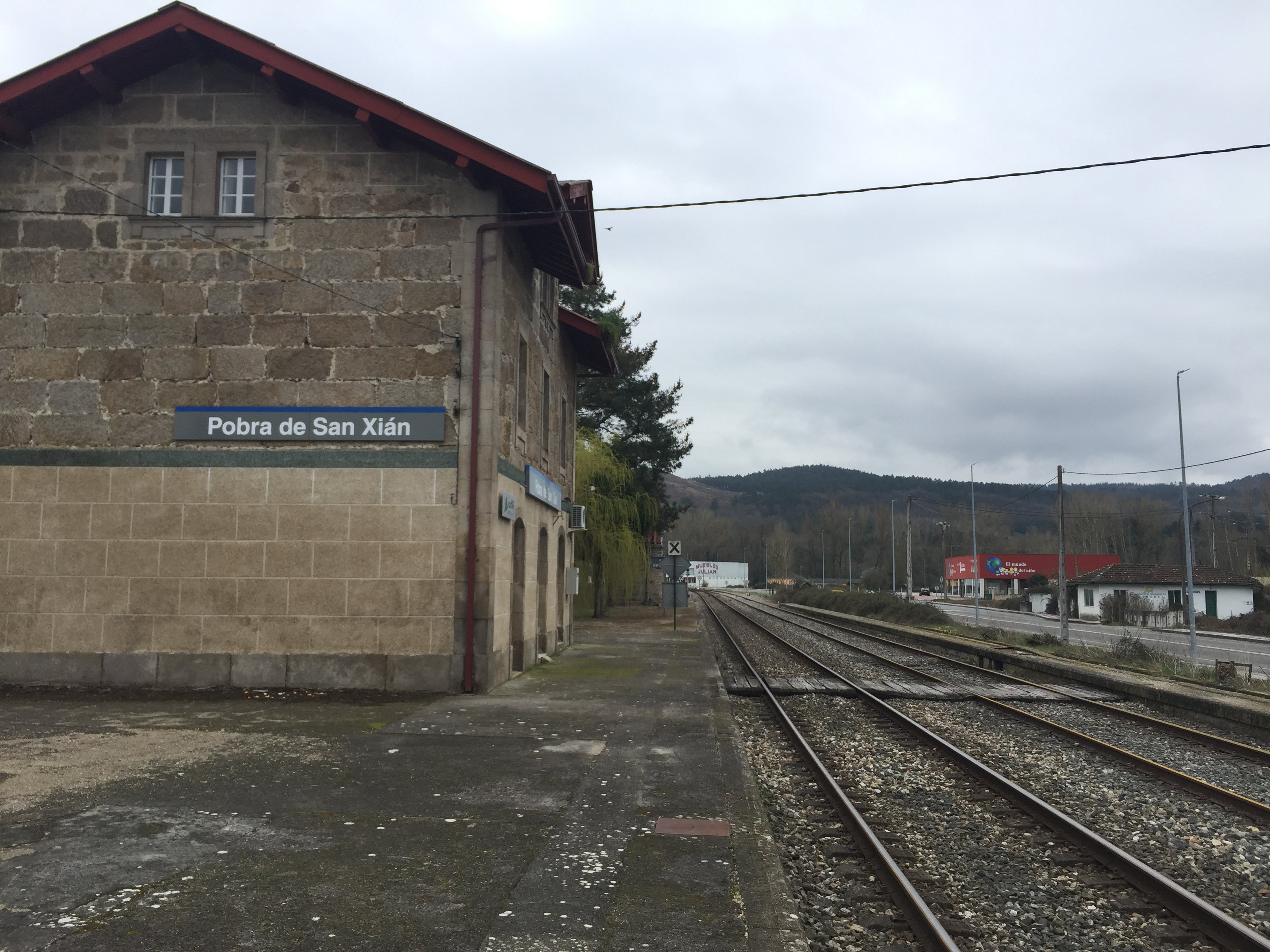 Estación ferroviaria de A Pobra de San Xiao, en el municipio de Láncara, provincia de Lugo, España.